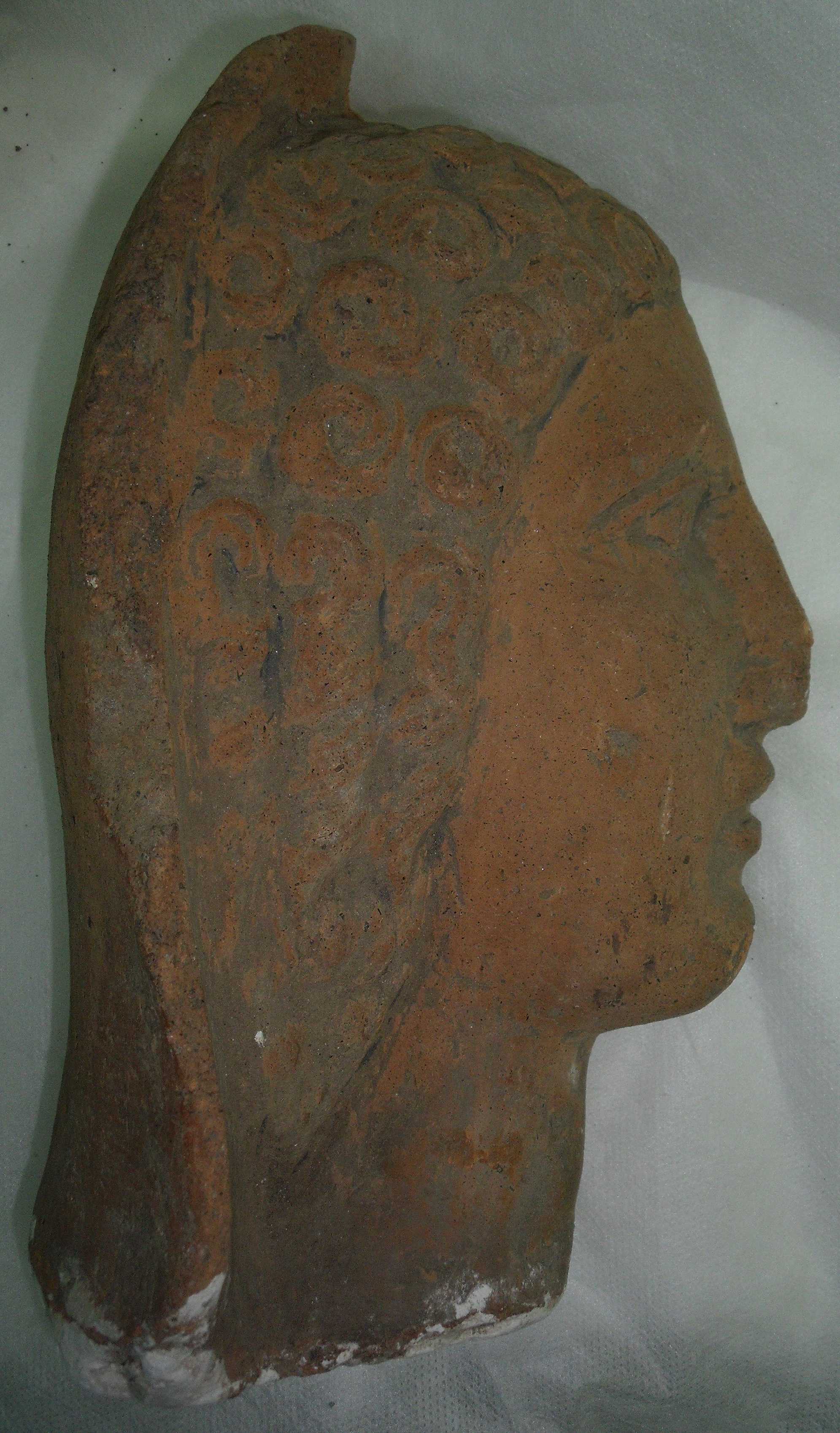 Mig cap femení vist de perfil, part dreta, amb mitja melena de rinxols. Època hel·lenística del segle IV-II aC.